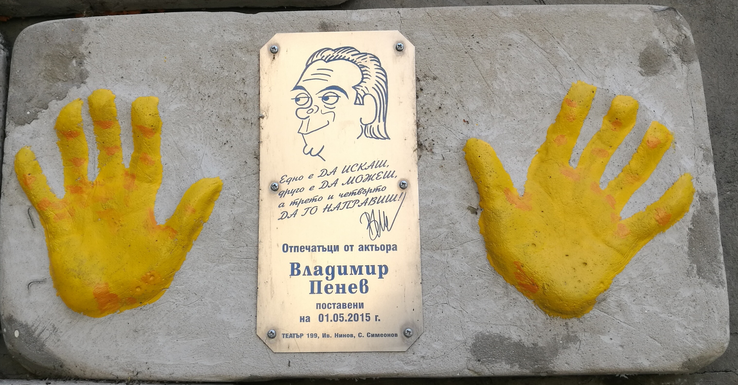 Стената на славата пред Театър 199 - пано с отпечатъци, послание и шарж на Владимир Пенев.